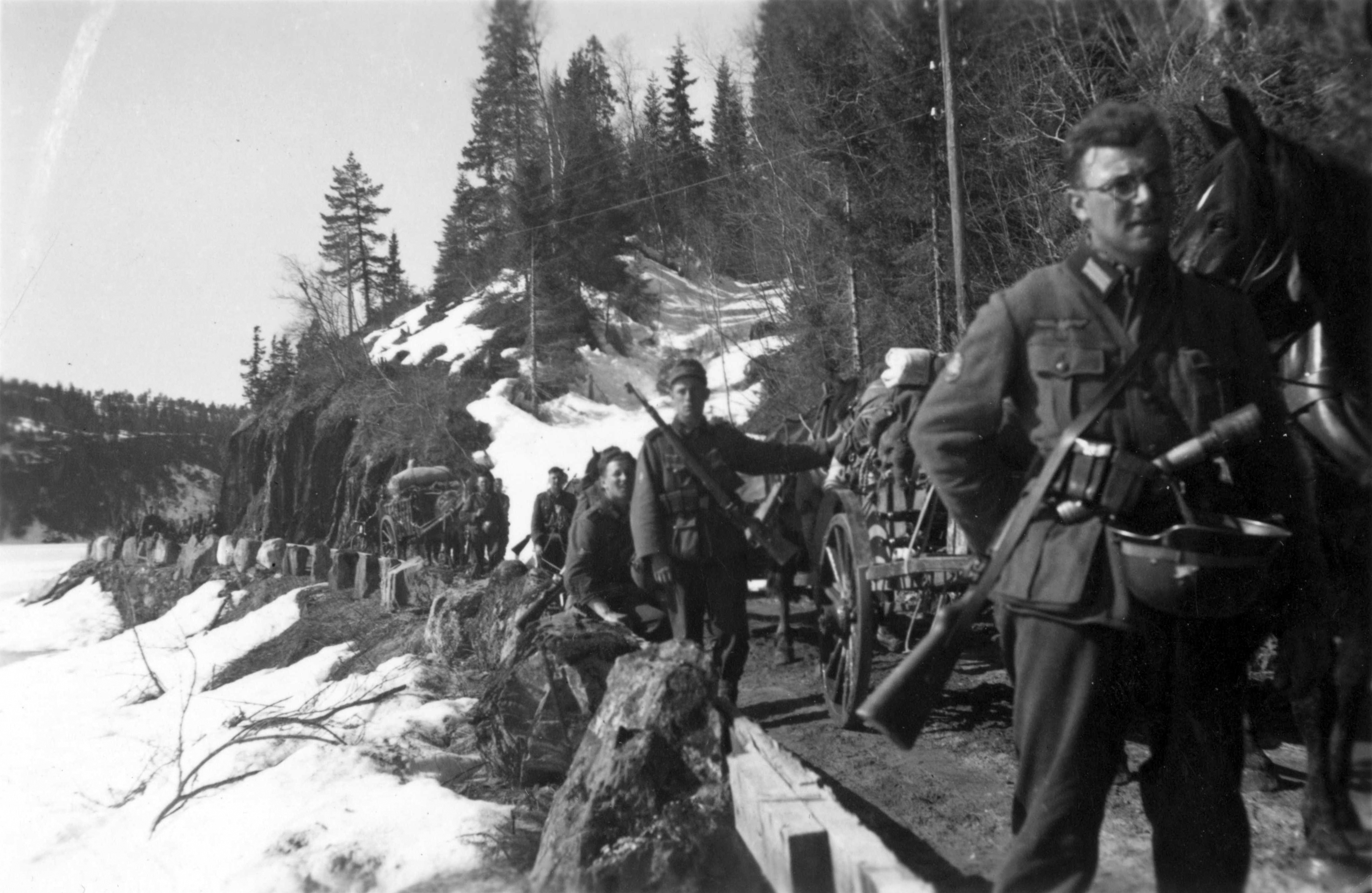 Heimsjøen Kvam i Nord-Trøndelag Tittel / Title: 4.mai 1940 ved Heimsjøen Kvam i nord-Trøndelag Hestene er rekvirert fra bøndene på strekningen. Bergjegerne hadde bare håndvåpen, ikke noe tren. Dato / Date: 04.05.1940 Fotograf / Photographer: Ukjent/Uknown Sted / Place: Kvam,Trønderlag, Norge Eier / Owner Institution: Arkiv i Nordland Lenke / Link: Arkiv i Nordland Arkivreferanse /Archive reference: AIN.NA143.0101 Fra Dag Skogheims Privatarkiv Tekst bak på bildet: Am Snaasa-see 7. kompani 2. bataljon av Bergjegerreg. 137